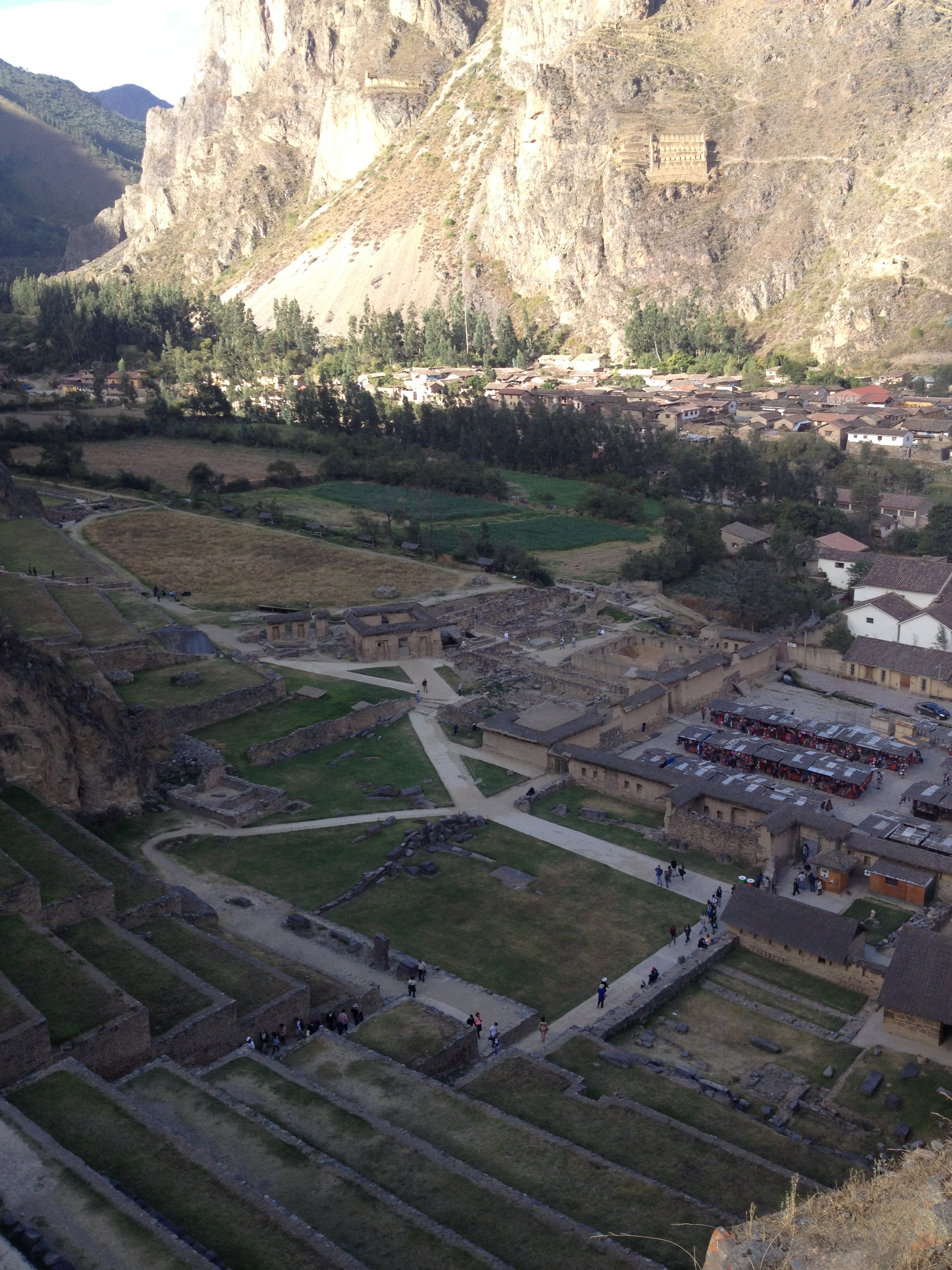 Vista de Ollantaytambo, poblado de origen Inca